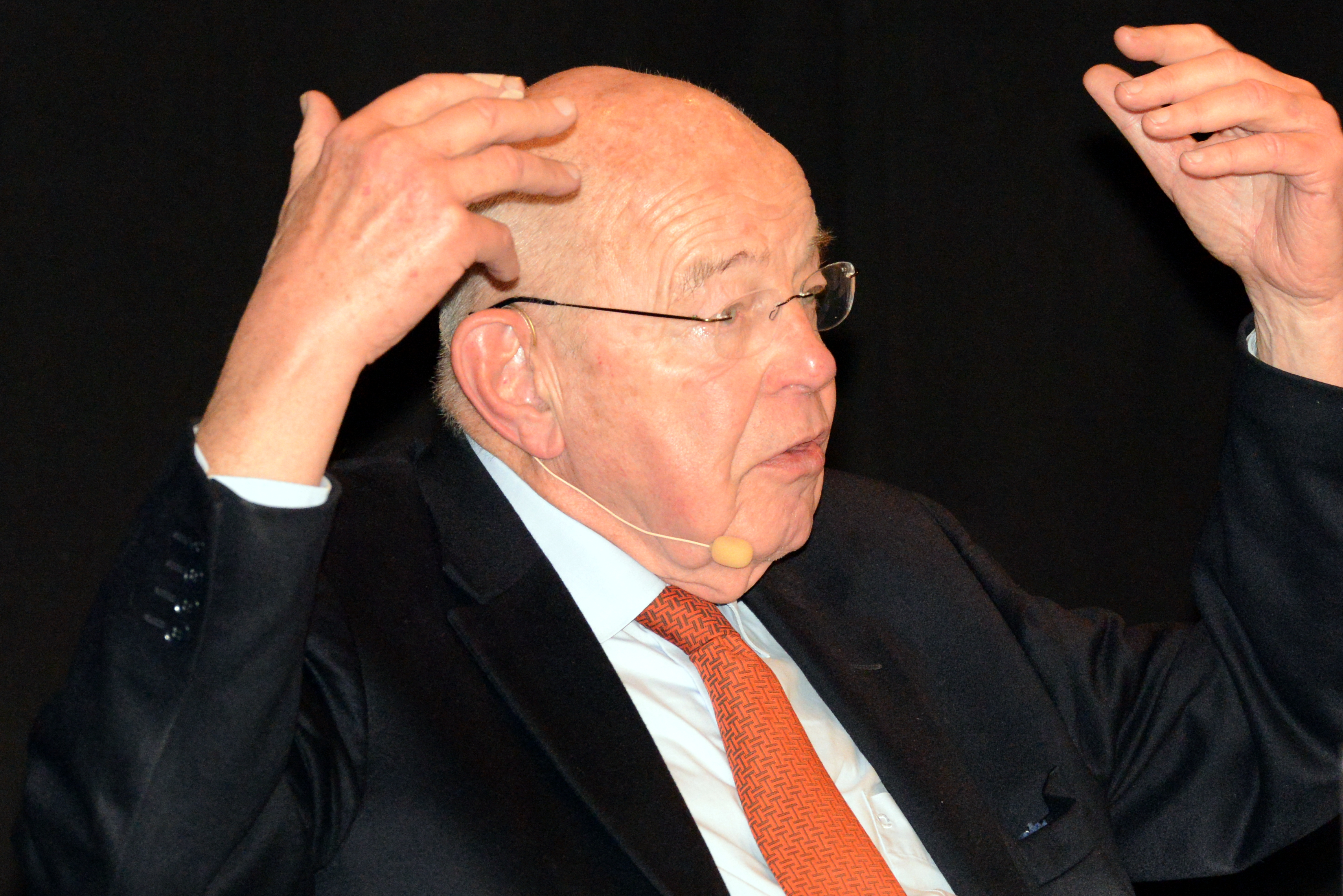 Am Kader vun der Wanderausstellung «Between Shade and Darkness. Le sort des Juifs du Luxembourg de 1940 à 1945», hat d'Gemeng Reckeng op der Mess, zesumme mat der asbl MemoShoah Lëtzebuerg, fir den 31. Mäerz 2015 op en Debat iwwer de Rapport vum Historiker Vincent Artuso zu der «Kollaboratioun vun der Lëtzebuerger Verwaltungskommissioun mat Nazi-Däitschland», invitéiert. Mam Vincent Artuso hunn diskutéiert de fréiere Minister an Auteur vum Buch Luxemburg im Wandel der Zeiten, Erinnerungen (1927-2014), Jean Hamilius, als Zäitzeien, an den Henri Juda, President vu MemoShoah Lëtzebuerg. D'Danielle Schumacher, Journalistin beim Lëtzebuerger Wort, huet d'Diskussioun moderéiert. De Jean Hamilius betount, datt hie säi Buch als Reaktioun op en Artikel am Land vum 11. November 2011 geschriwwen huet. Hie war entsat iwwer dat wat hien do huet misse liesen a wollt seng Erënnerungen un d'Zäit vun der Occupatioun dogéint setzen. Den Artikel am Land hat d'Iwwerschrëft Dépasser le mythe national a war vum Vincent Artuso.